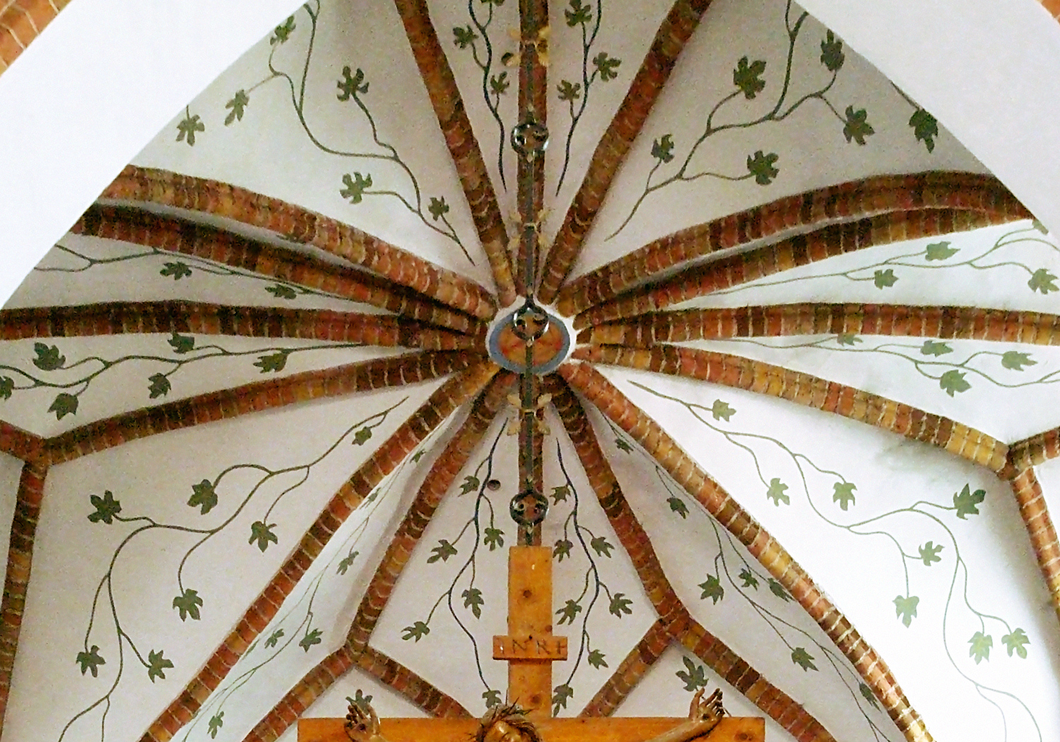 Szamotuły, kolegiata, sklepienie (Szamotuły - Poland, collegiate, vault).